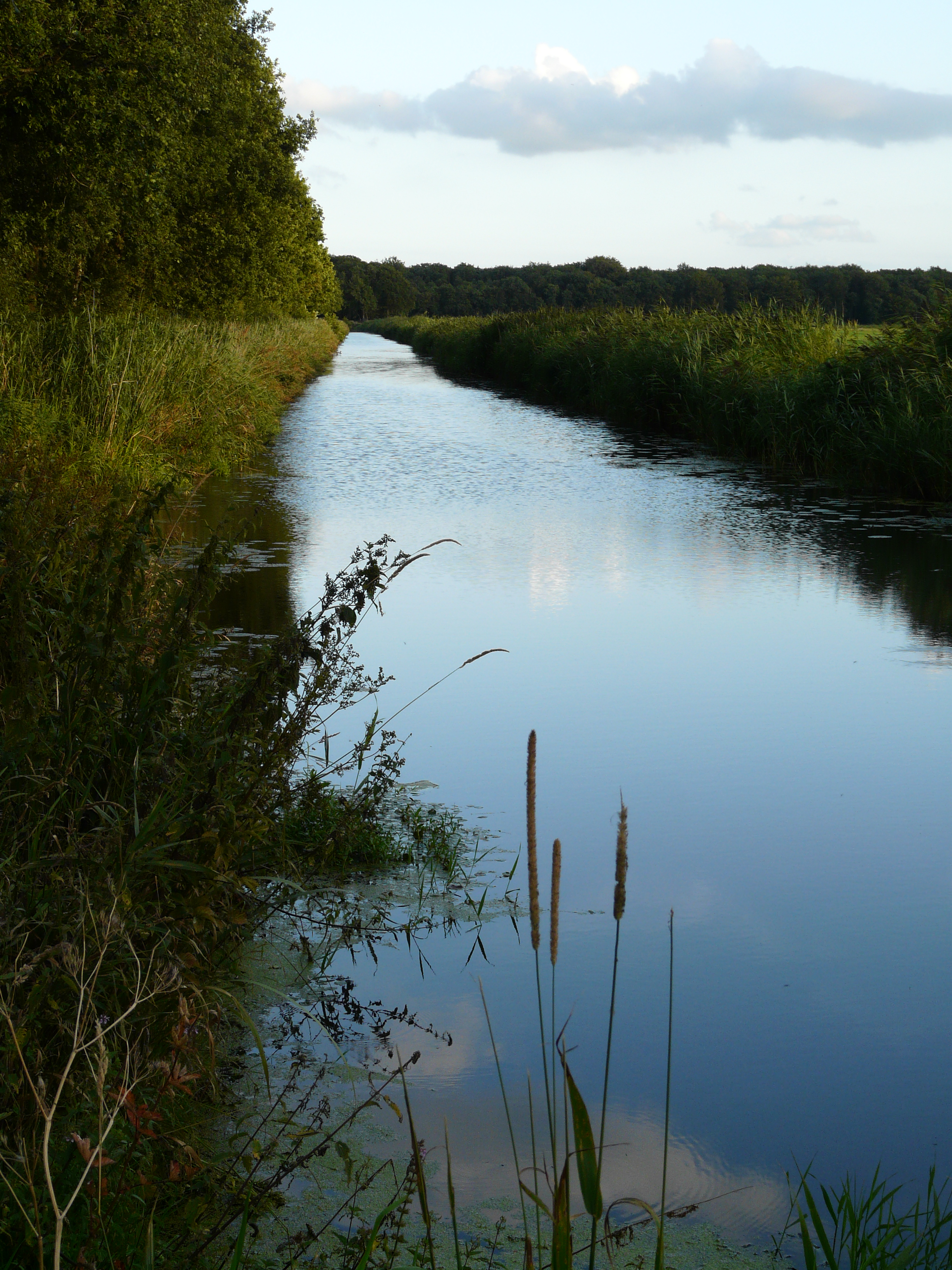 It Ferbiningskanaal tusken it Selmien en Heidehuzen